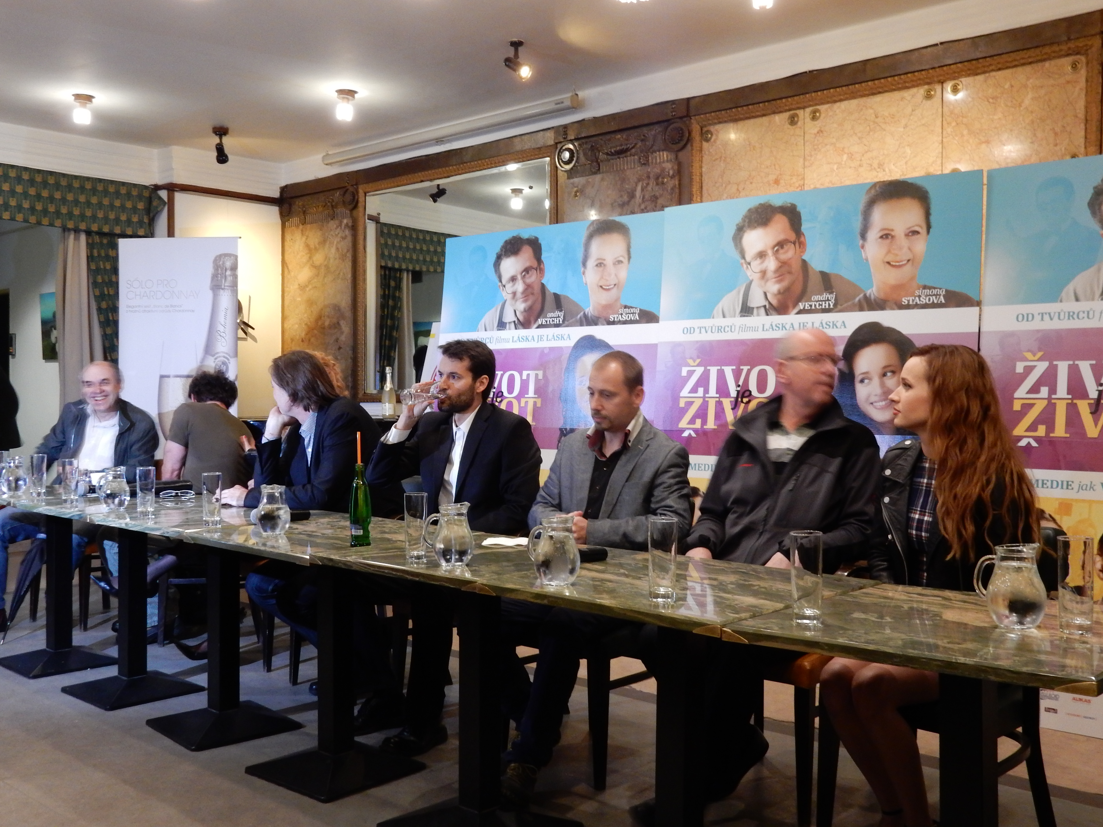 Fotky z novinářské konference z 20.5.2015 - Autor Karolína Černá (Blanka Borová) pro & 10Mpix.cz